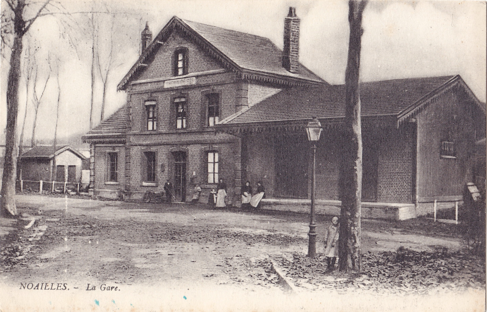 Carte postale ancienne sans mention d'éditeur : NOAILLES - La Gare